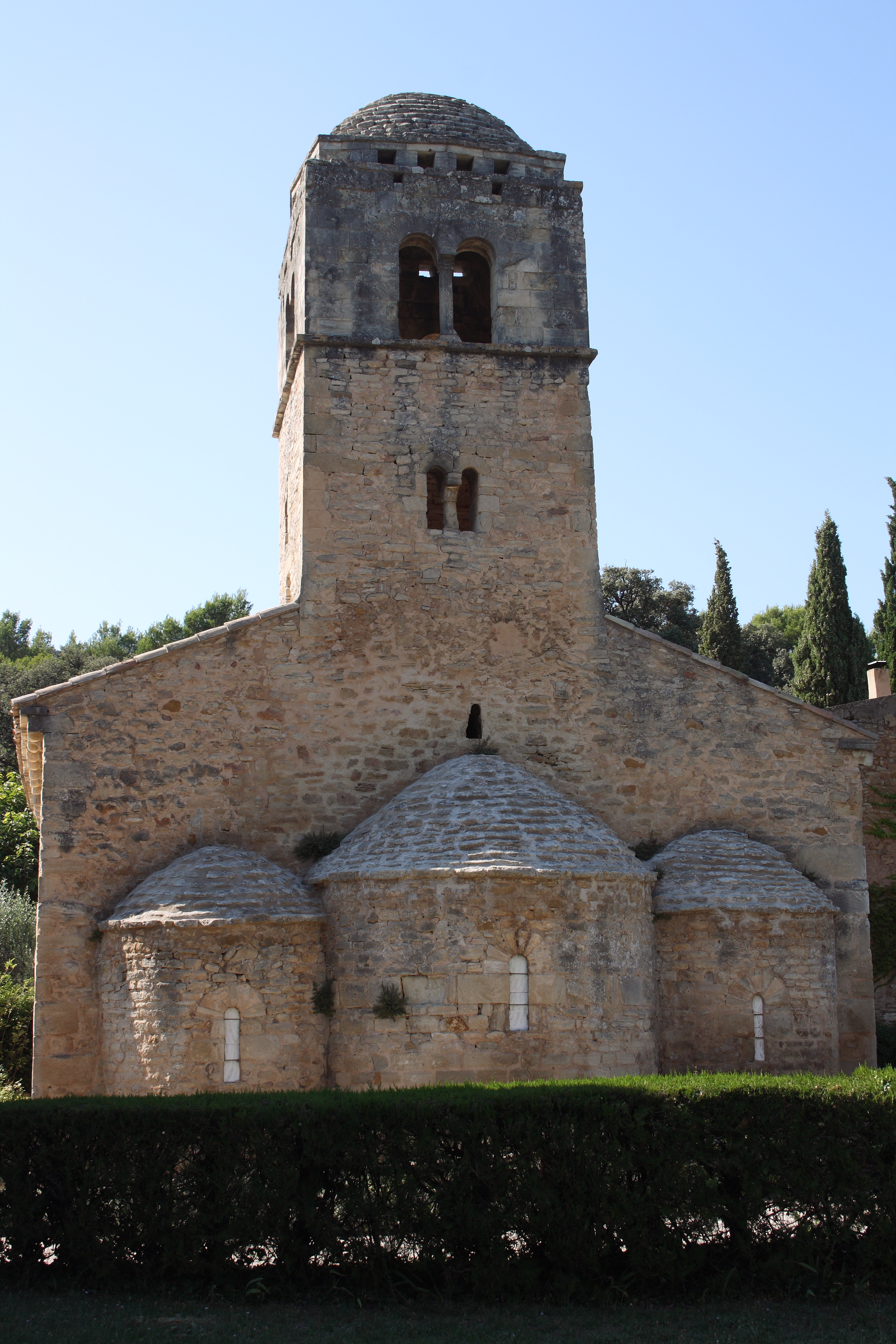 Romanische Kapelle Sainte-Madeleine in Bédoin, einer Gemeinde im Département Vaucluse in der französischen Region Provence-Alpes-Côte d’Azur, Dreiapsidenanlage, Ansicht von Osten